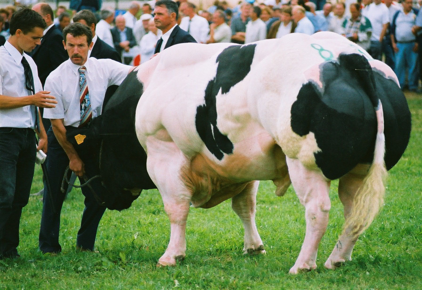 Zuchtbulle auf der Ausstellung in Libramont